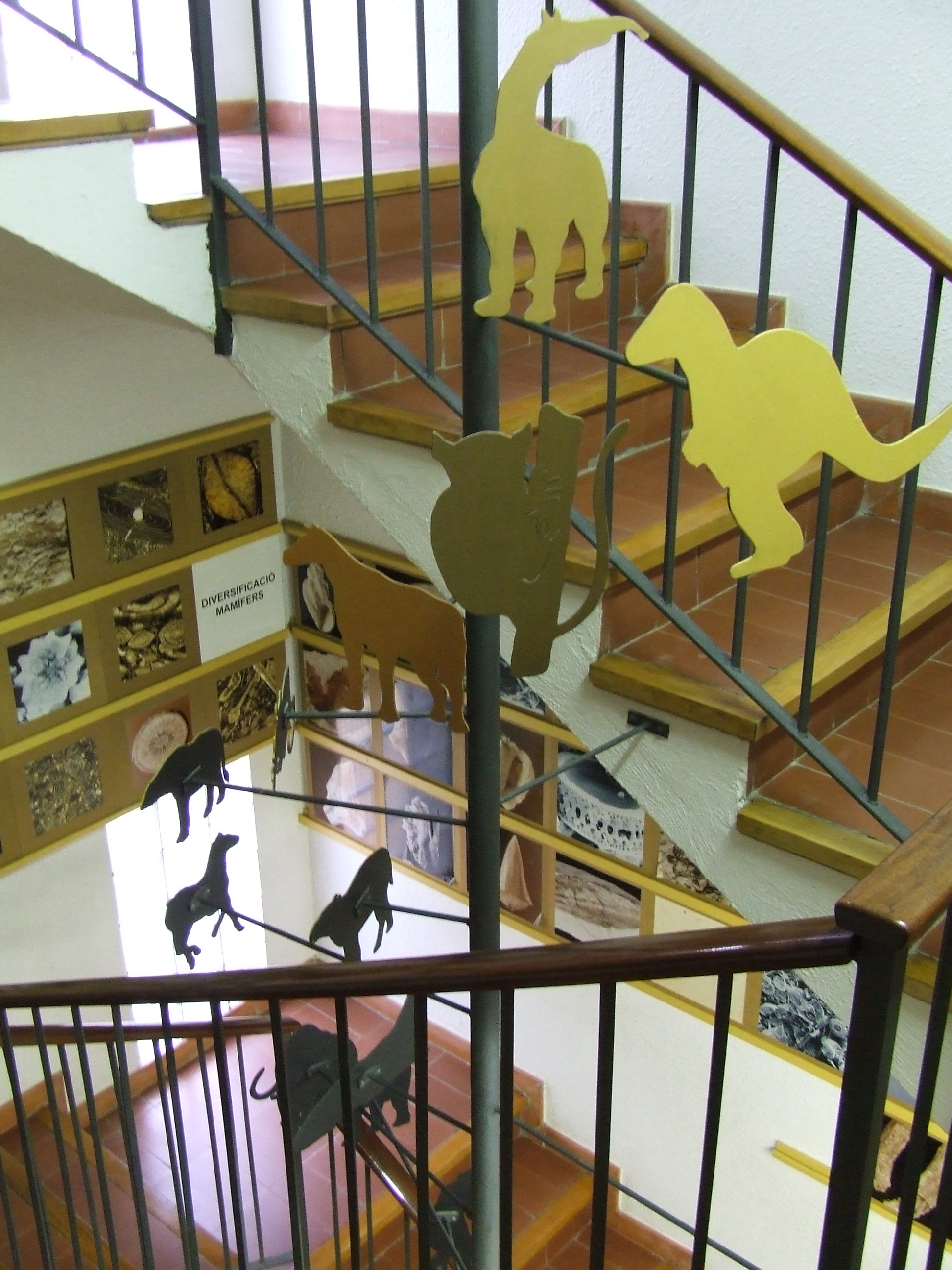 Museu de la Conca Dellà (Isona, Pallars Jussà)